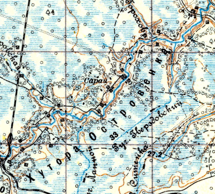 Топографическая карта Ленинградской области, квадрат VIc (Красные Горы), деревня Островёнка